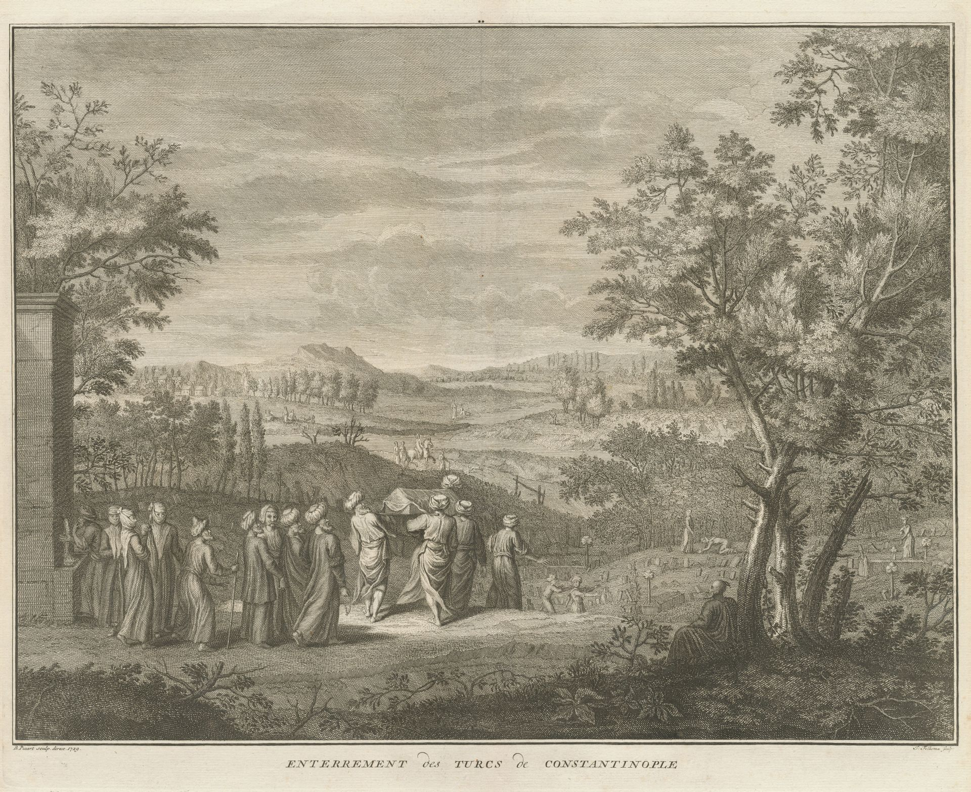 Picart'ın "Türklerin Konstantiniyye'ye girişi" tablosu.